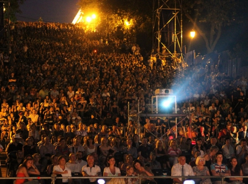 Киноконцерт - "Метрополис" в сопровождении симфонического оркестра на Потемкинской лестнице